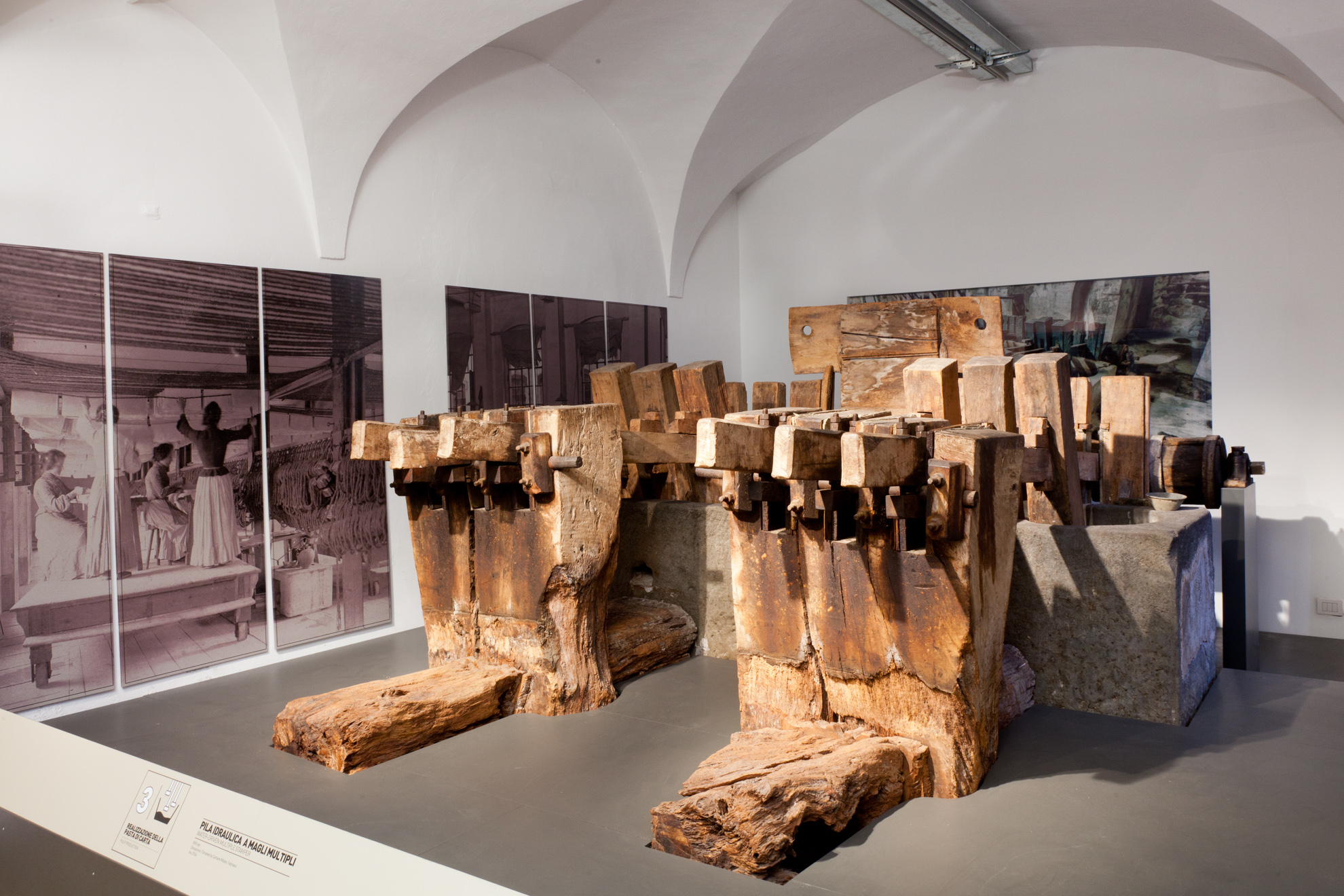 Pila idraulica a magli multipli esposta al Museo nazionale della scienza e della tecnologia Leonardo da Vinci di Milano.